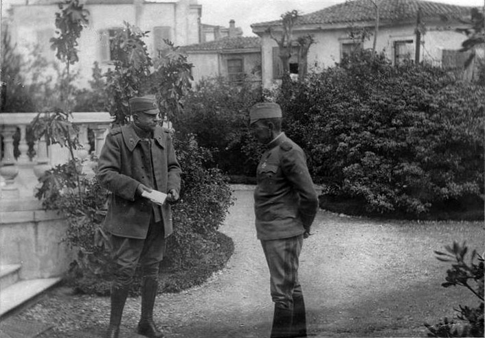 Le général serbe Boyovitch commandant_le_QG .